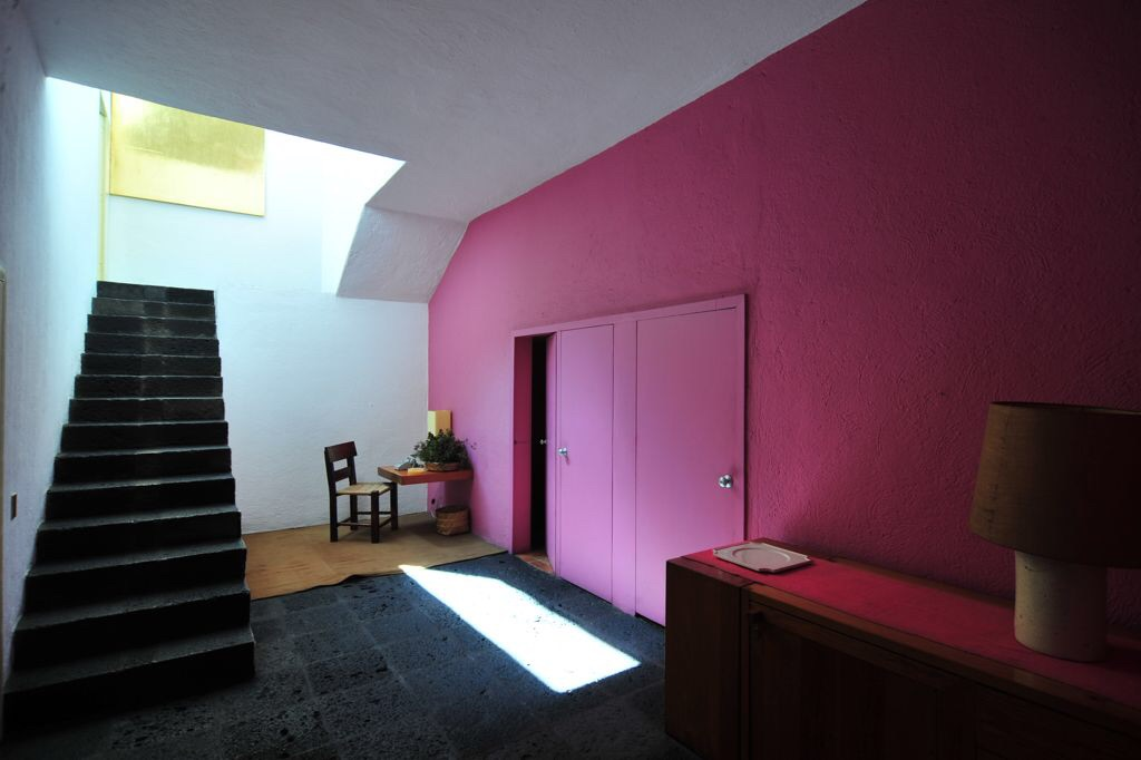 墨西哥建築師易斯巴拉干自宅 Casa Luis Barragan, Tacubaya, Mexico City